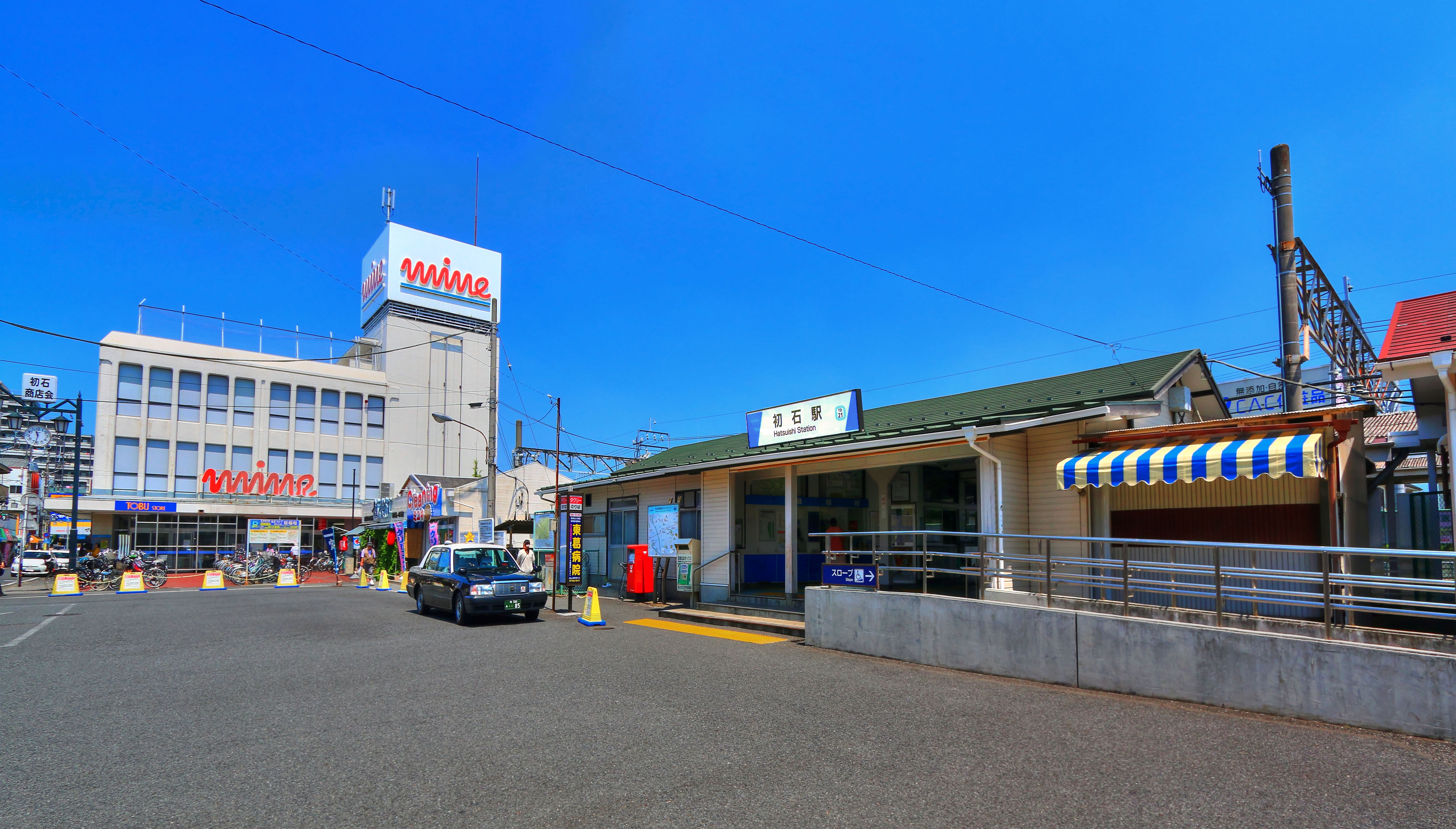 初石駅